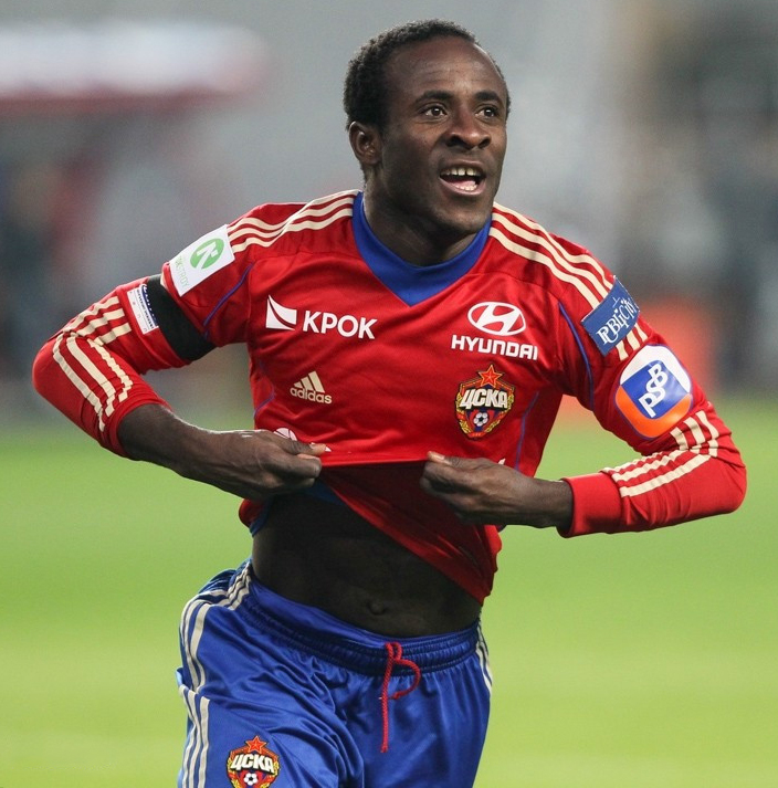 ЦСКА - Спартак